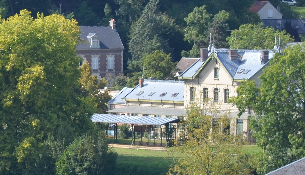 Gare de Pierrefonds depuis le château .